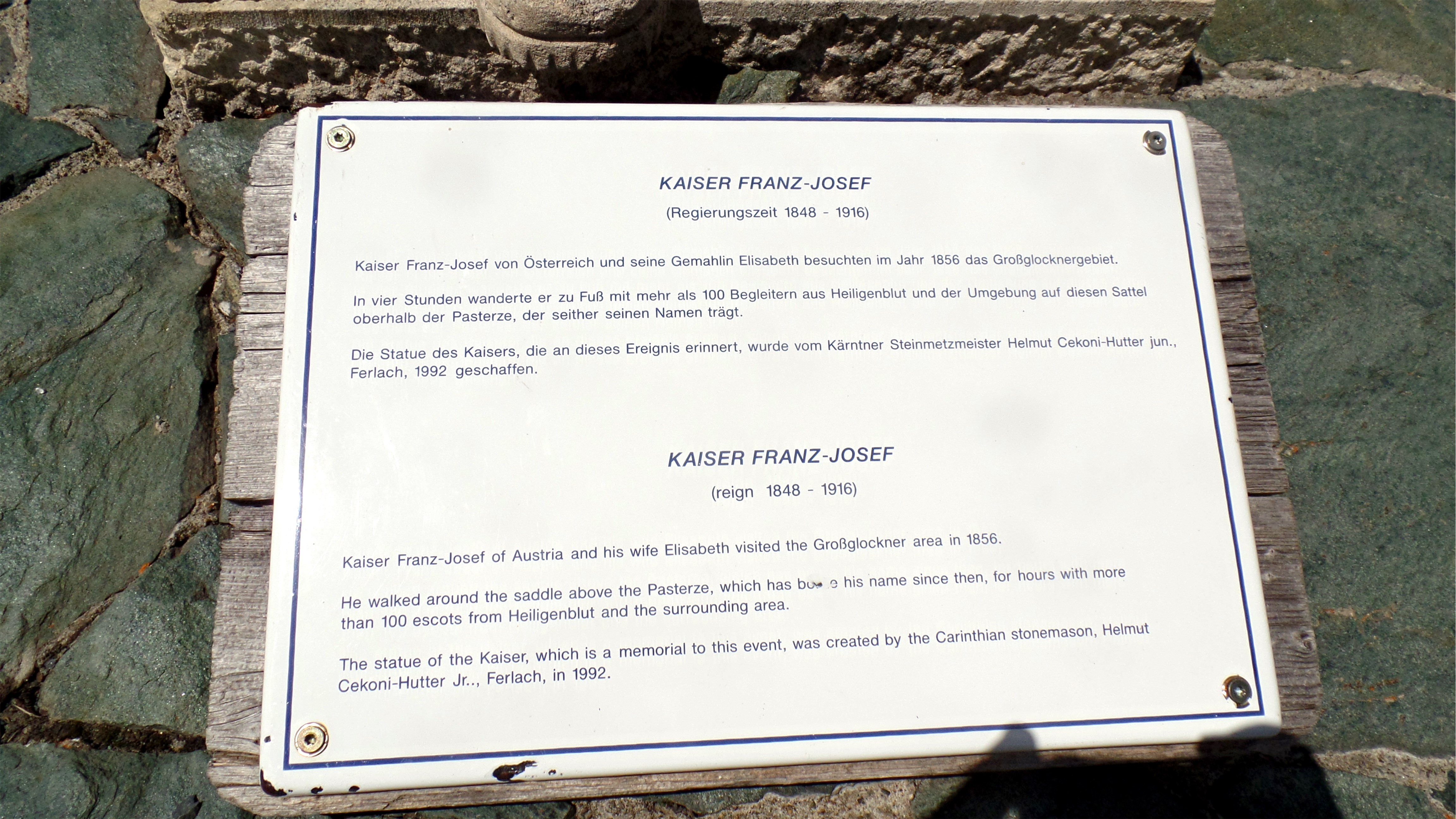 Infotafel am Kaiserstein der Franz-Josephs-Höhe